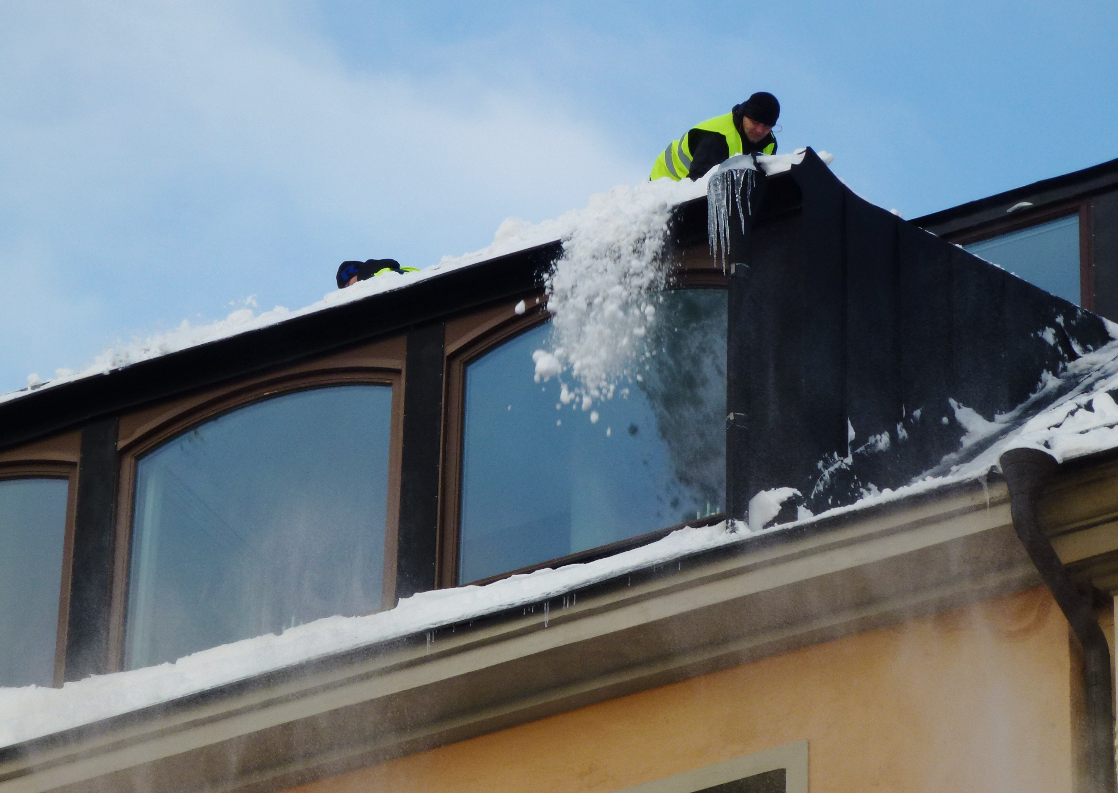 Norr Mälarstrand takskottning